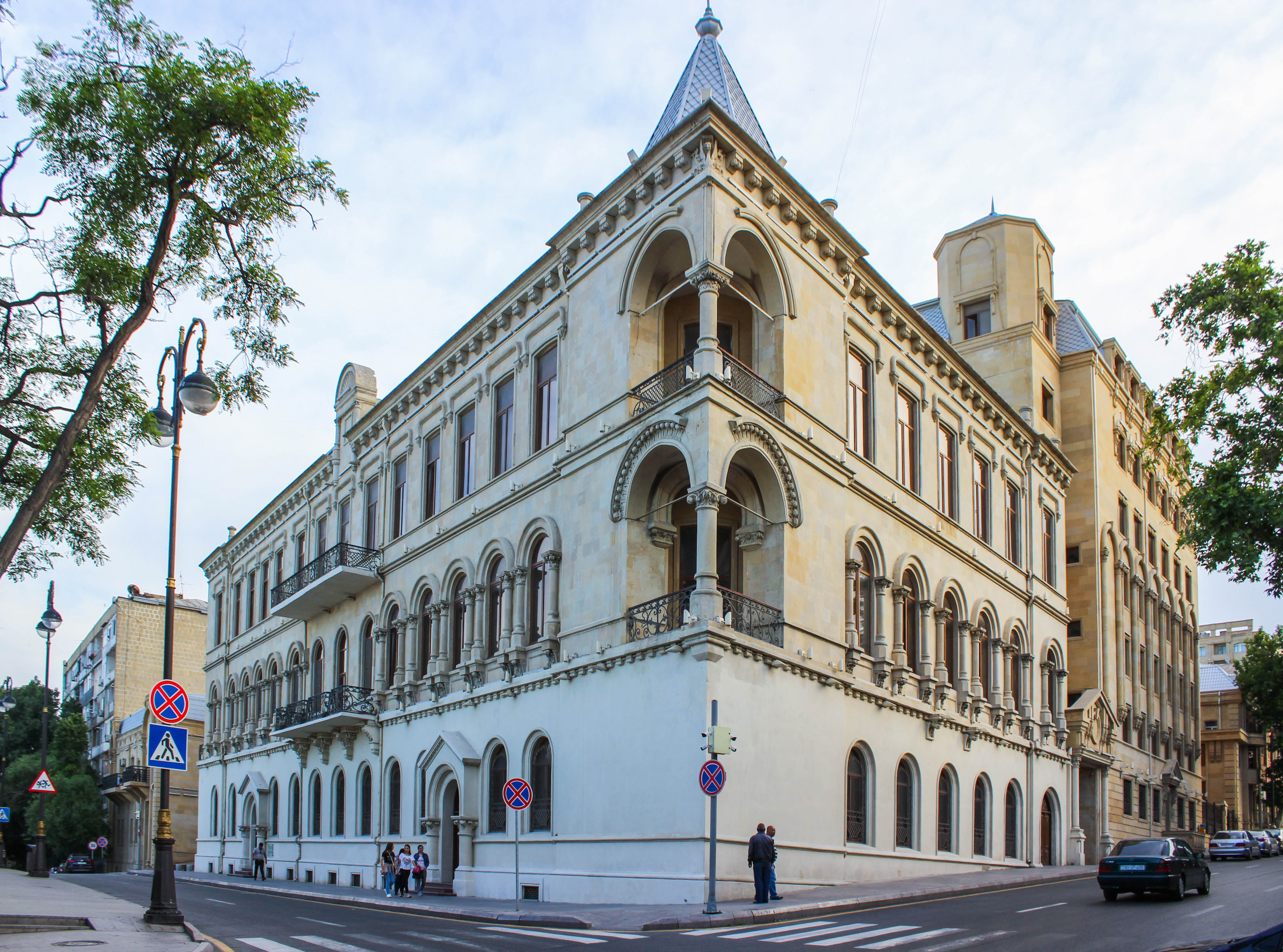 Rotşildlərin binası 2019-cu ildə